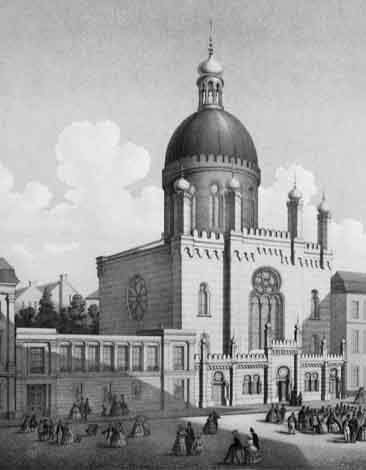 Außen- und Innenansicht der Synagoge Glockengasse